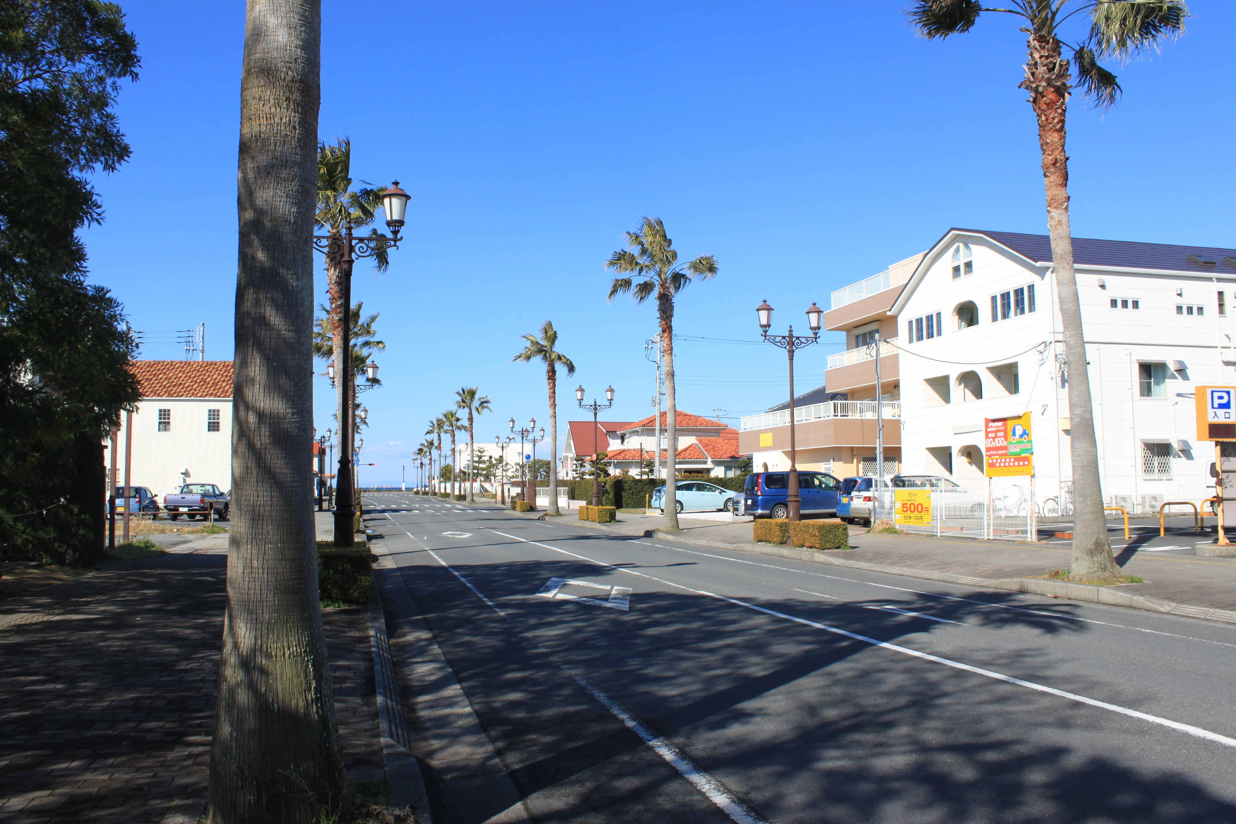 夕映え通り